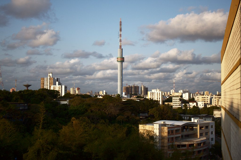 Torre da TV Itapuan (Rede Record) vista da Escola Politécnica da UFBa, em Salvador, Bahia.